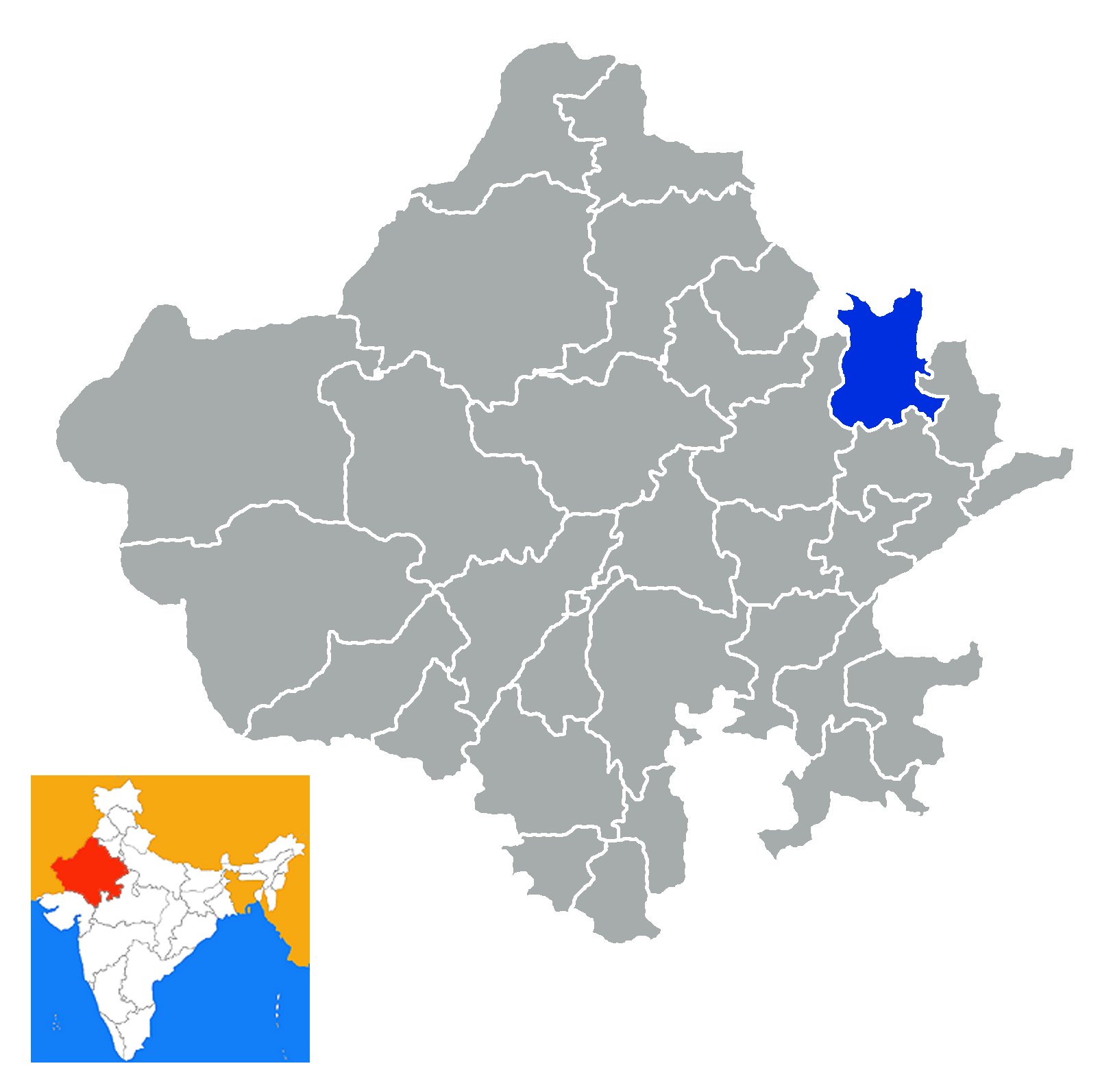 Distrito de Alwar Rajastan India